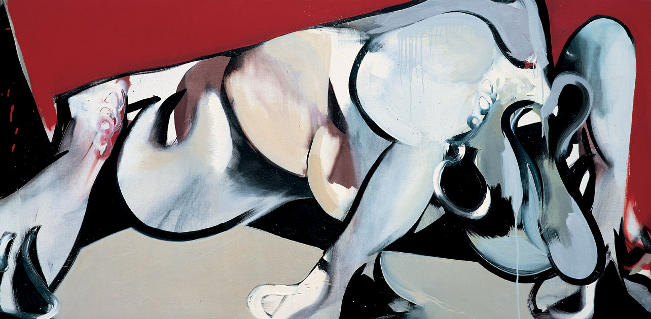 Œuvre d'Alain Ghertman, peintre et illustrateur